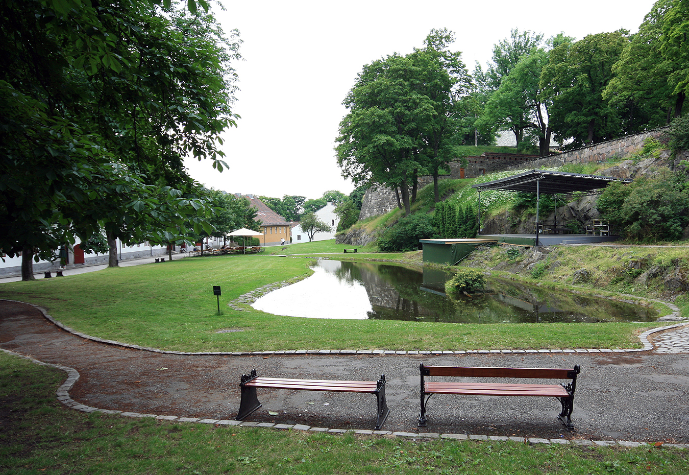 Karpedammen, Akershus festning, Oslo. Reetablert i 1960-åra.